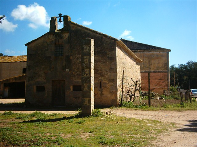 Ermita de Sant Benet (Tossa de Mar, Girona)